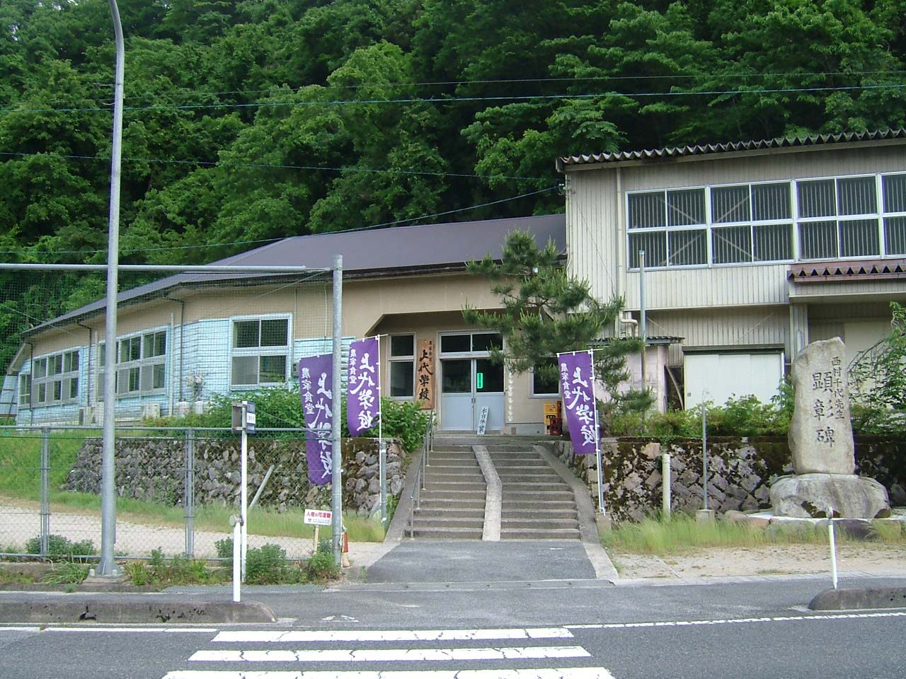 伯耆町立二部小学校、旧福岡分校